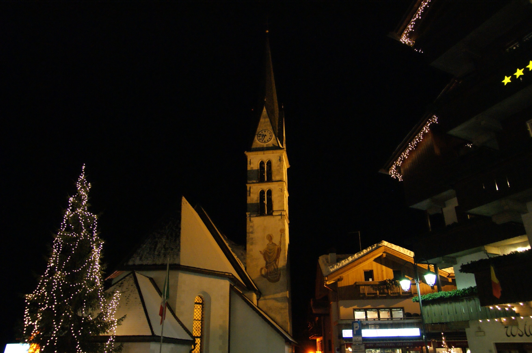 Alleghe: veduta notturna con la chiesa di San Biagio.